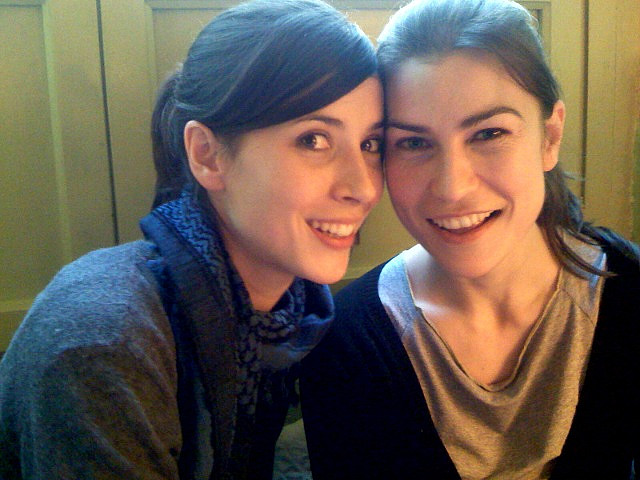 Bárbara Goenaga y Salomé Jiménez, las darias en sesiones previas en 3:19